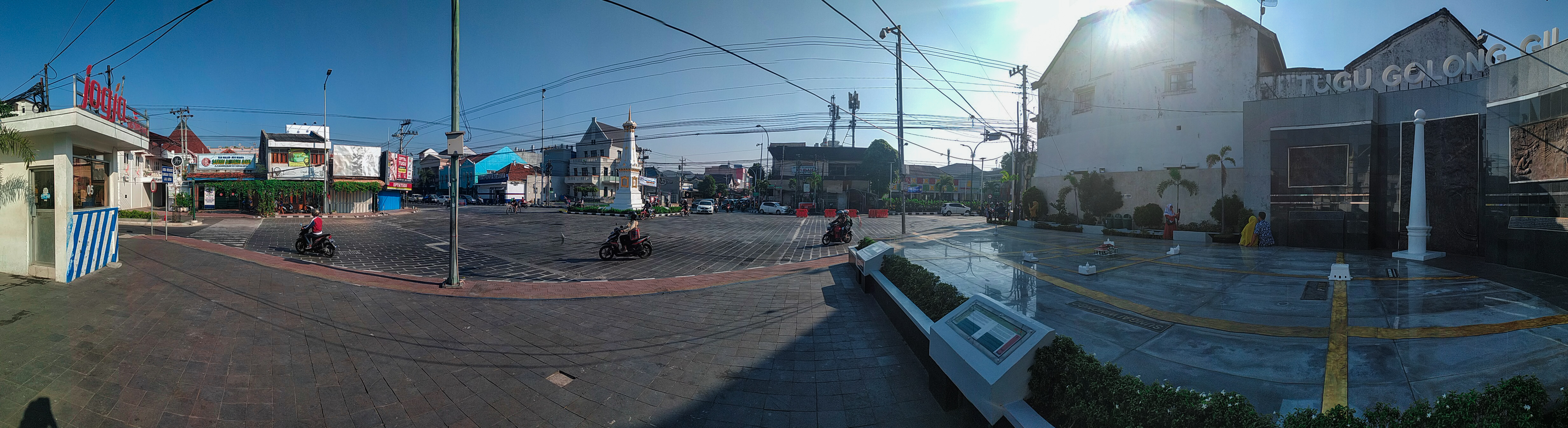 Foto Panorama Tuju Yogyakarta yang di ambil dari monumen tugu.